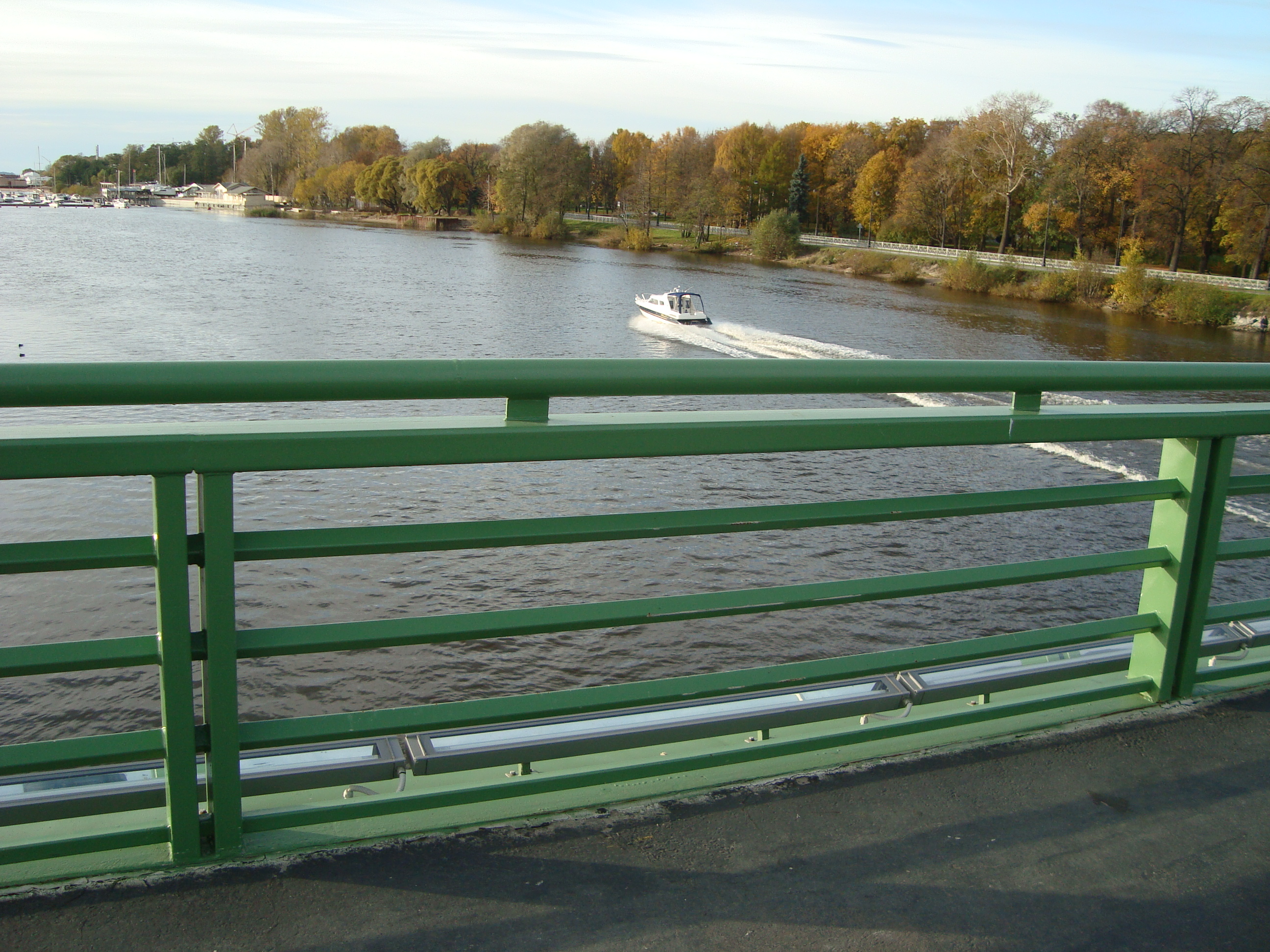 Перильное ограждение Большого Петровского моста